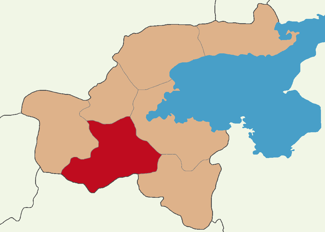 Bitlis Merkez ilçesinin konumu